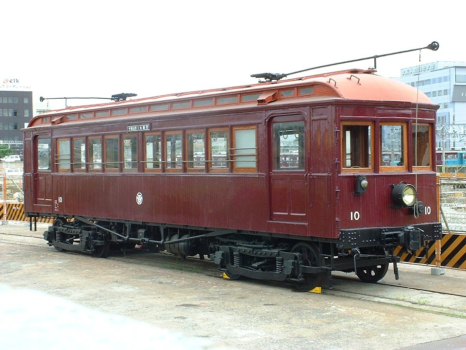 新京阪デロ10 阪急正雀工場にて